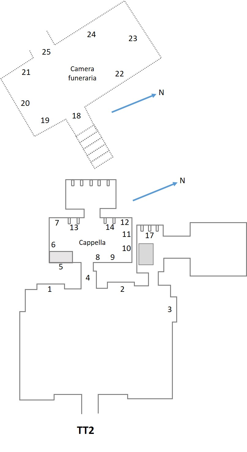 Planimetria schematica della tomba TT2